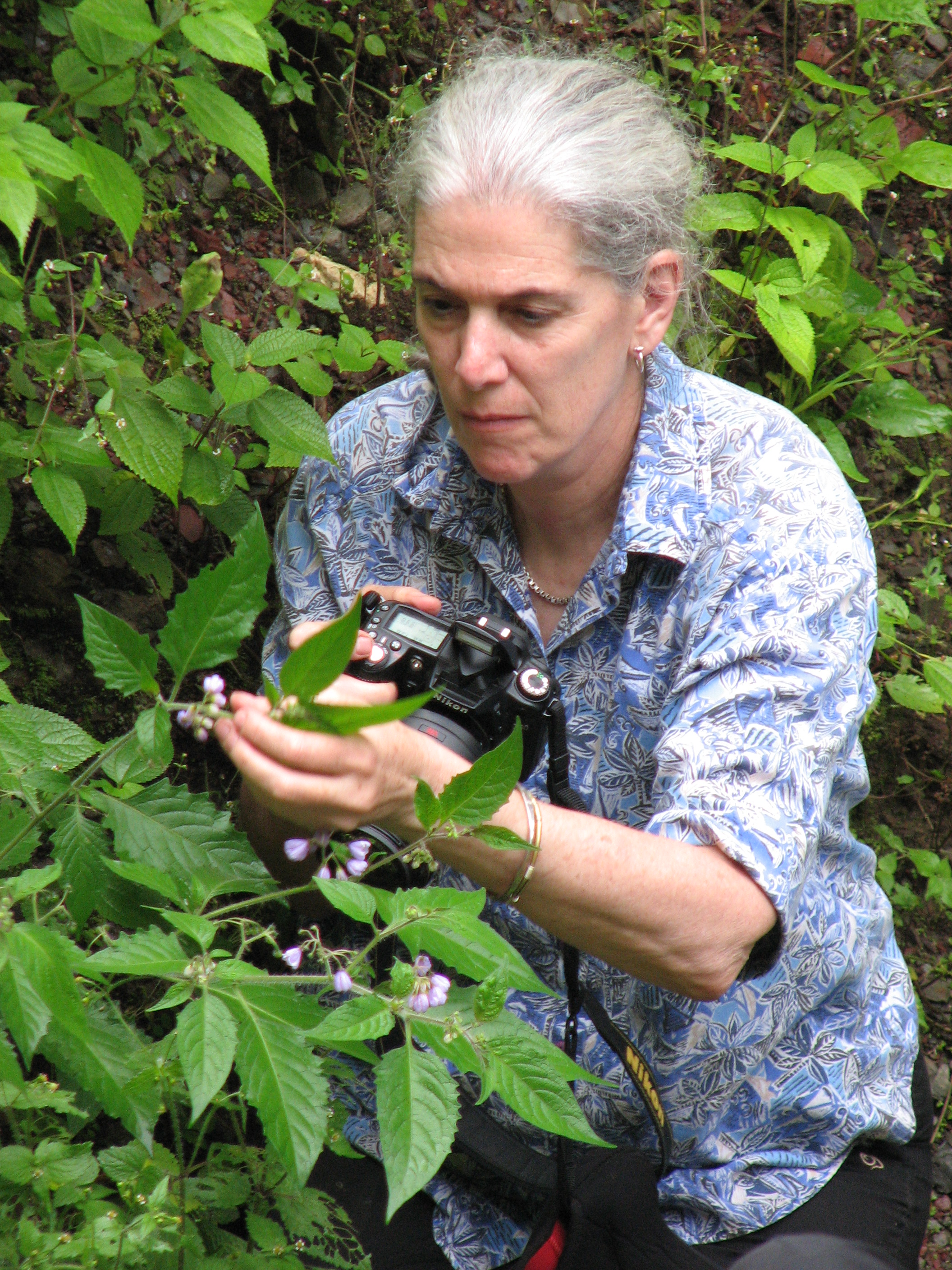 Dr Sandra Knapp, Head of Plants Division Department of Life Sciences - Natural History Museum/ Cromwell Road/London SW7 5BD/ United Kingdom. Collecting Solanum sinuatiexcisum in Cusco, Peru